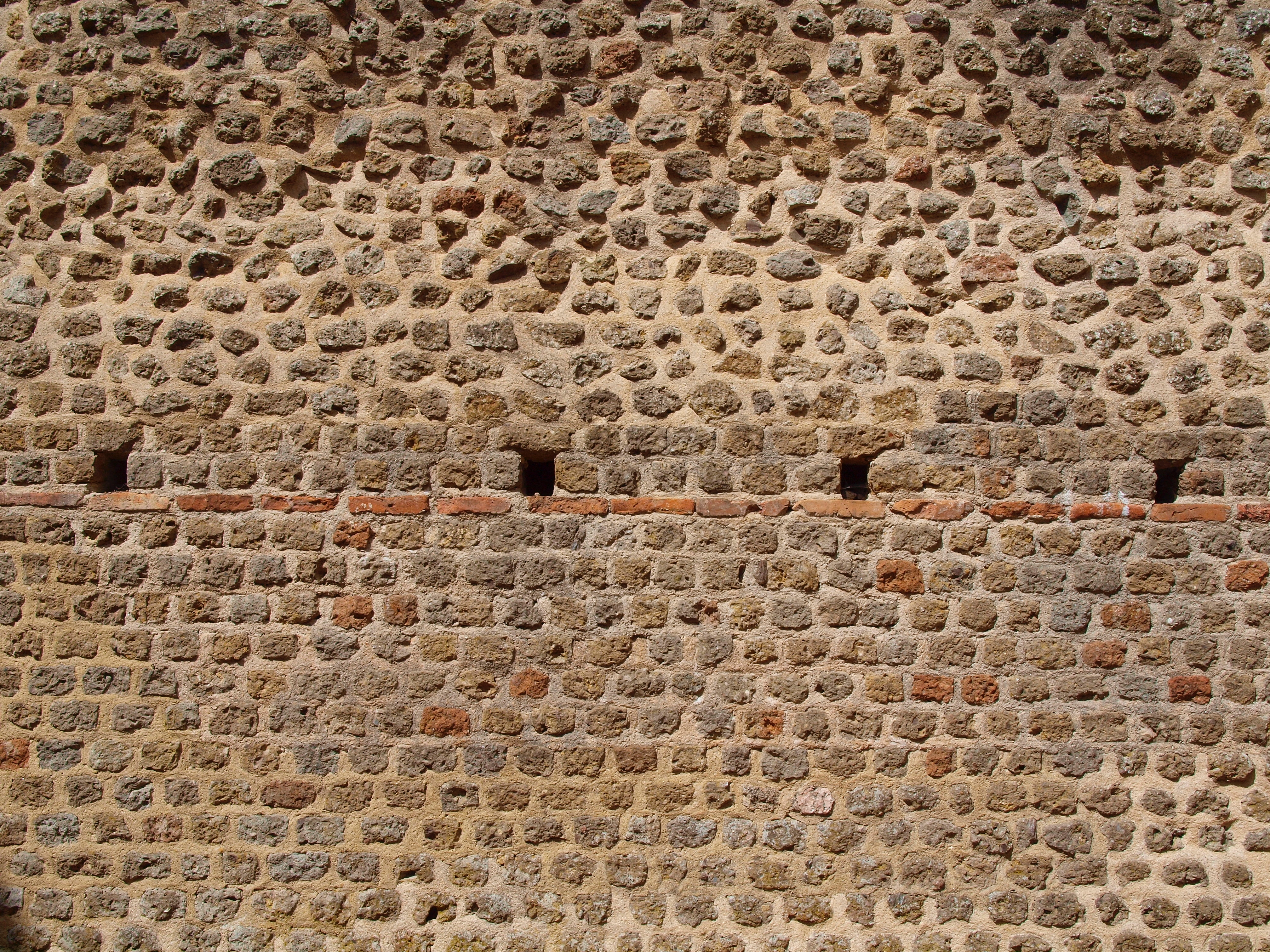 Cassinomagus, commune de Chassenon, Charente, France S-O. Mur intérieur dans les thermes classés MH. .